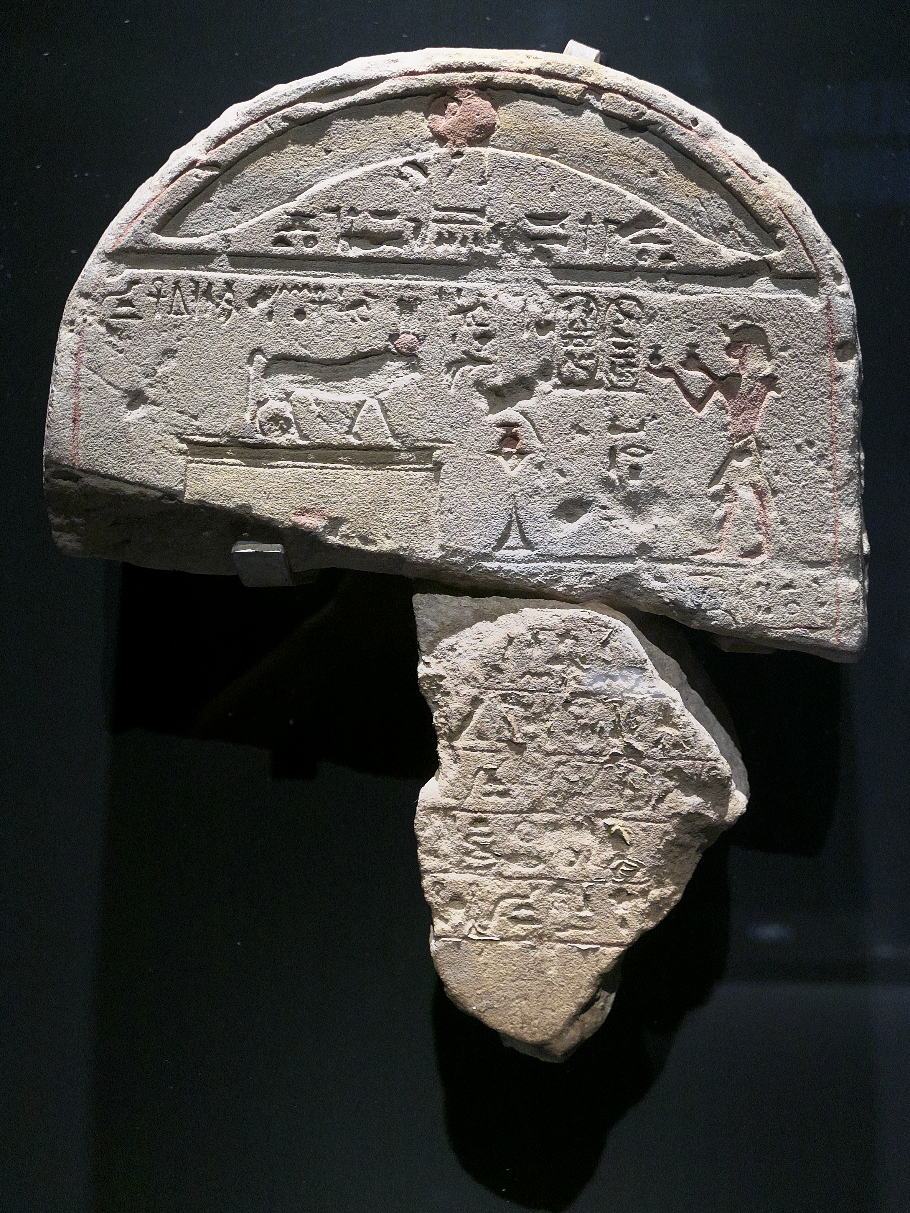 Estela, piedra arenisca, (332-323 a.C.) encontrada en Armant. El faraón Alejandro Magno ofrece dos naves al toro sagrado Bukhis, que también vivió durante el reinado de Darío III, según recogen los textos jeroglíficos de la estela del toro.